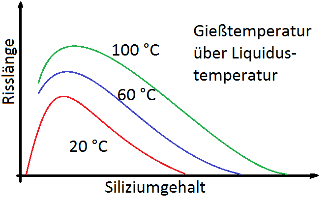 Warmrissverhalten von Aluminium: Risslänge in Abhängigkeit vom Siliziumgehalt bei verschiedenen Temperaturen über der jedweiligen Liquidustemperatur (änder sich ebenfalls mit dem Siliciumgehalt)